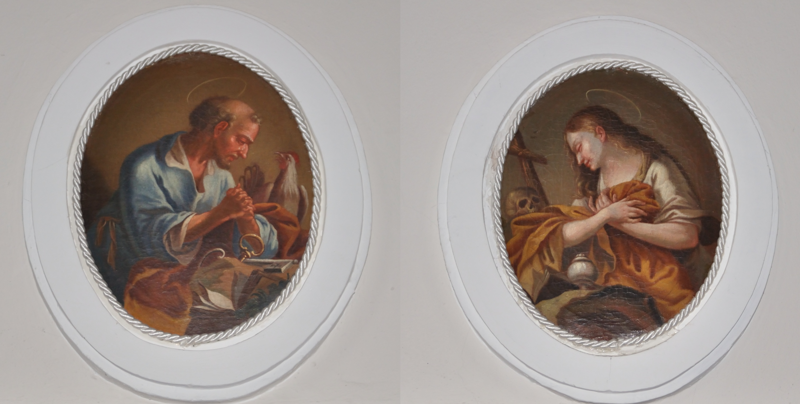 Fridolinskirche in Lörrach Stetten: Medaillons von Petrus und Magdalena über den Sakristeitüren